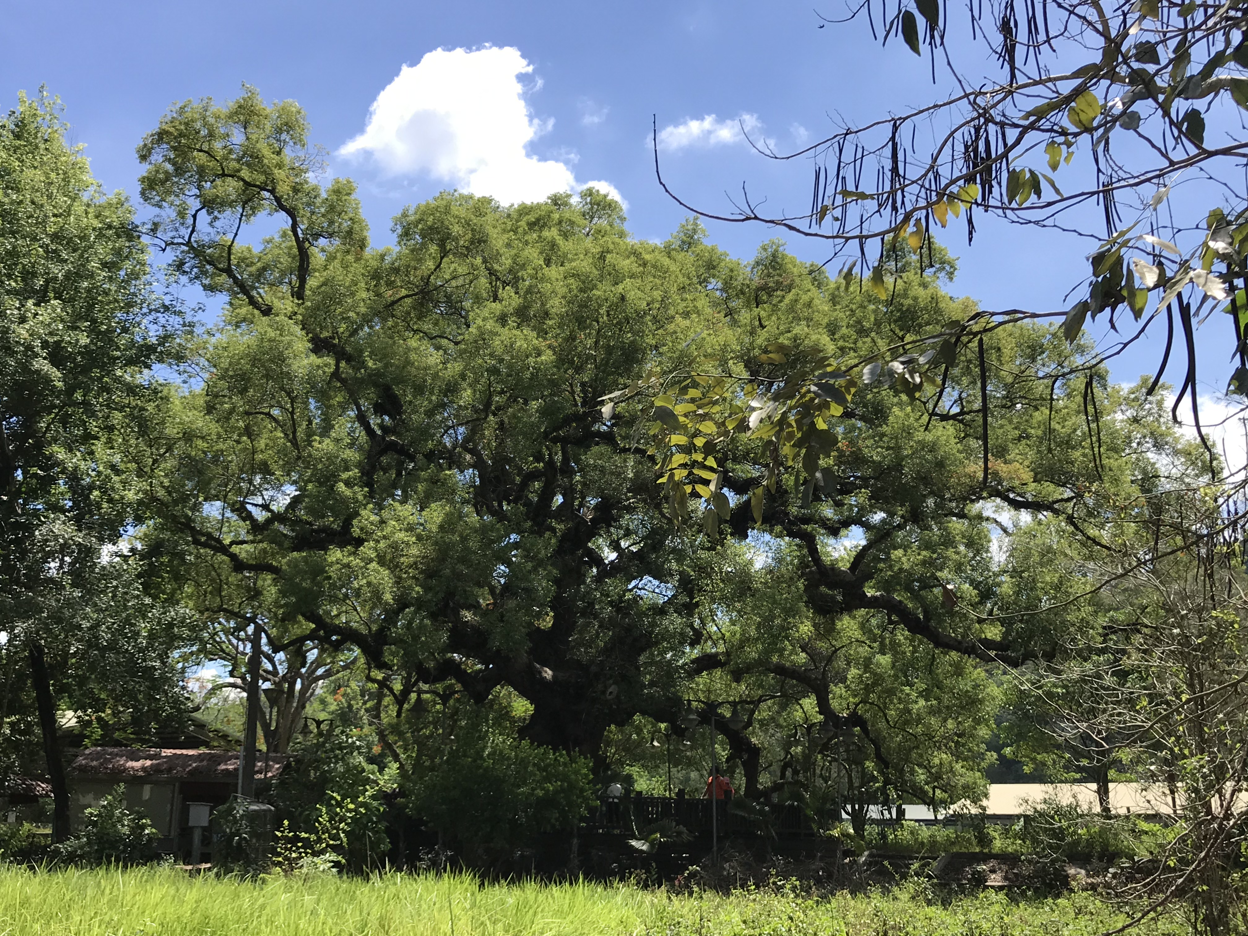 中文（台灣）: 車籠埔樹將軍